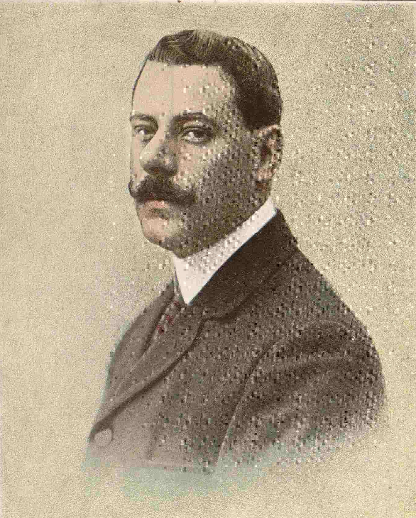 Enrique García Álvarez. fotografía de Franzen.